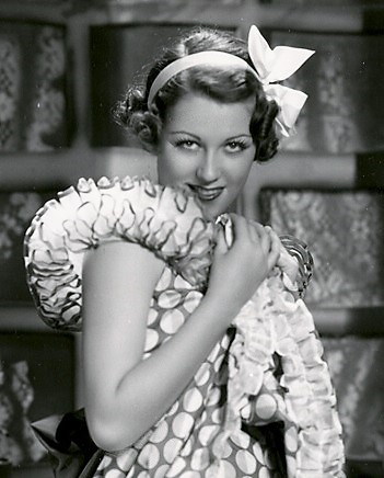 Philippa Hilber